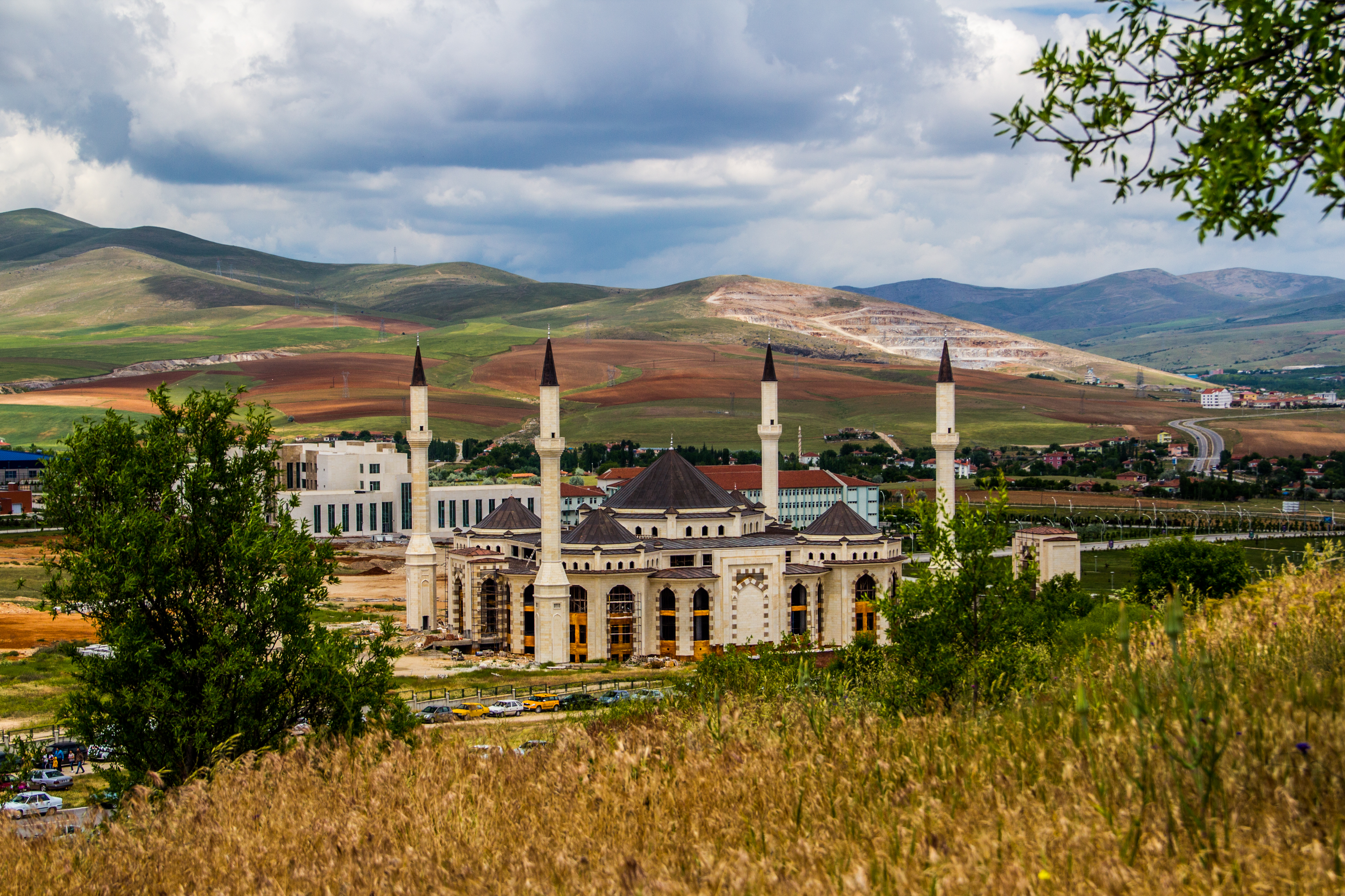 Özbağ/Kırşehir Merkez/Kırşehir, Turkey